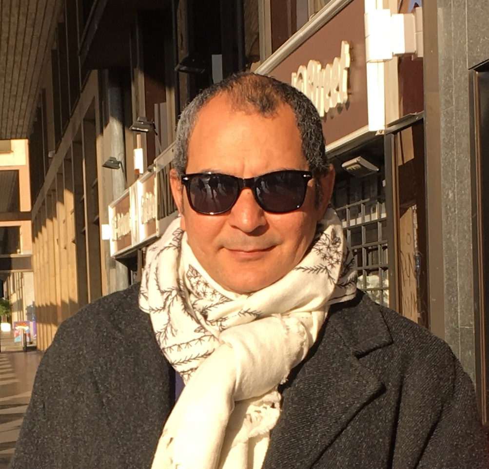 Ahmad Yamani